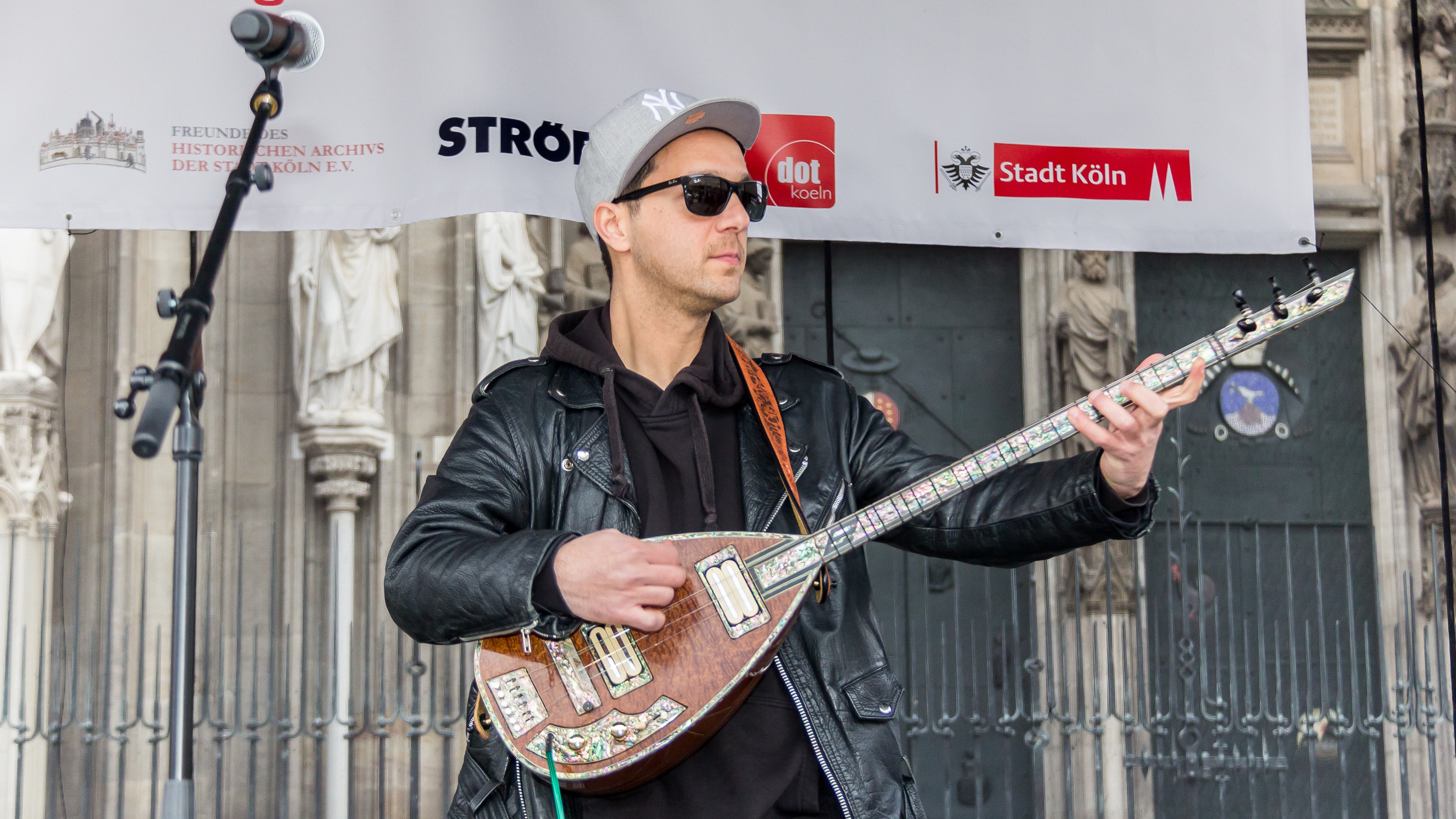 Auftaktveranstaltung zur Frühjahrskampagne der Stiftung Stadtgedächtnis „Kölner retten ihr Stadtgedächtnis“ Foto: Elektro Hafız